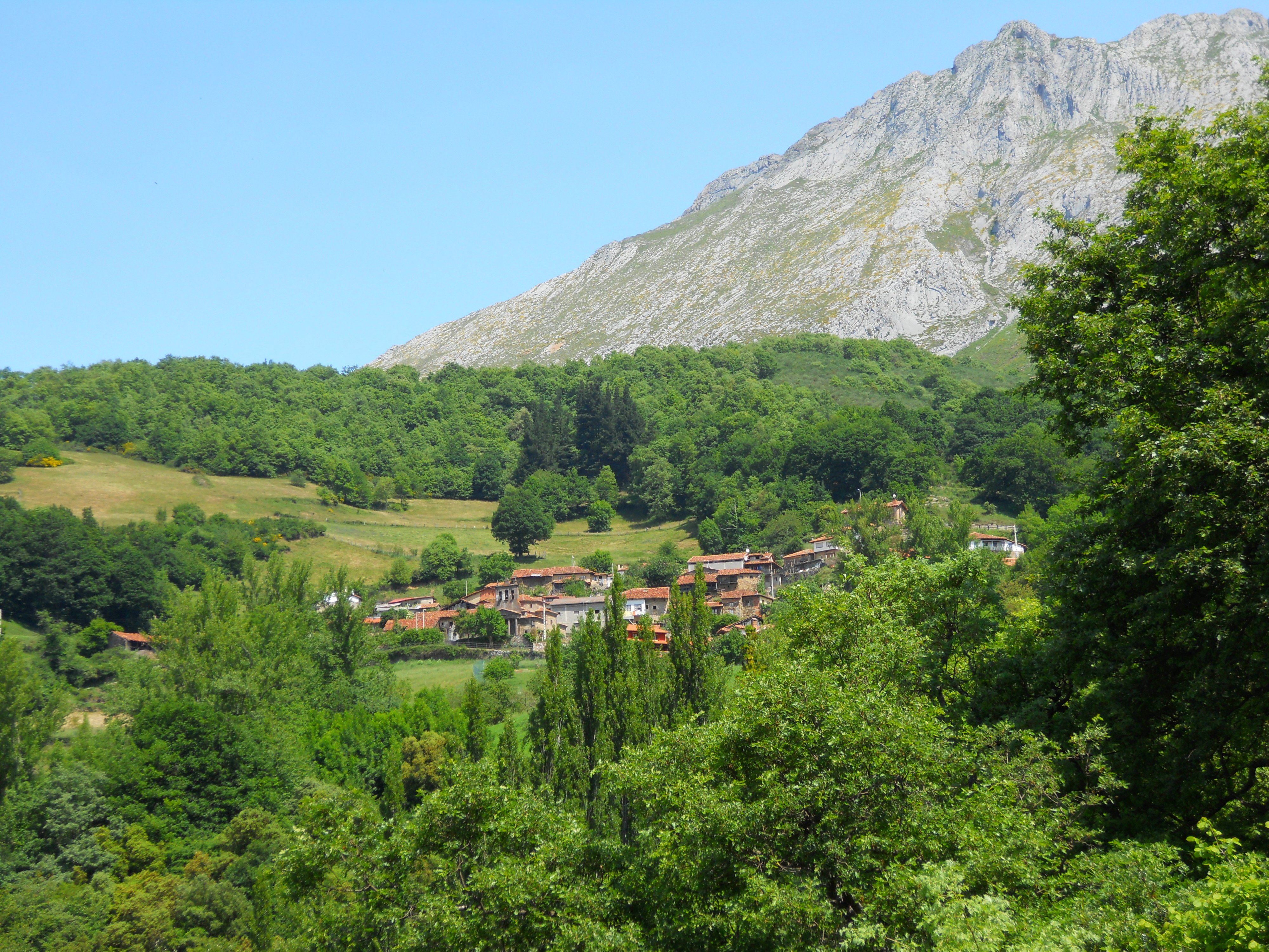 Salarzón